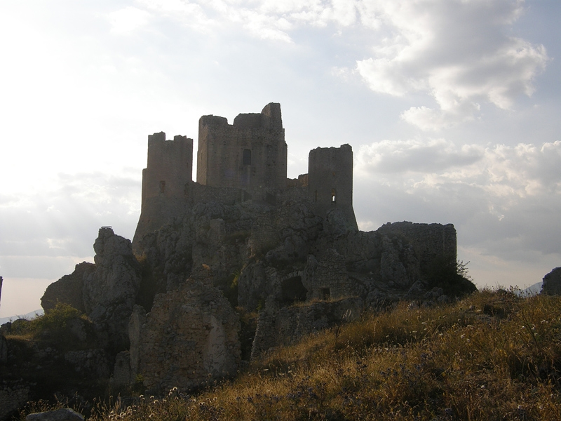 Rocca Calascio